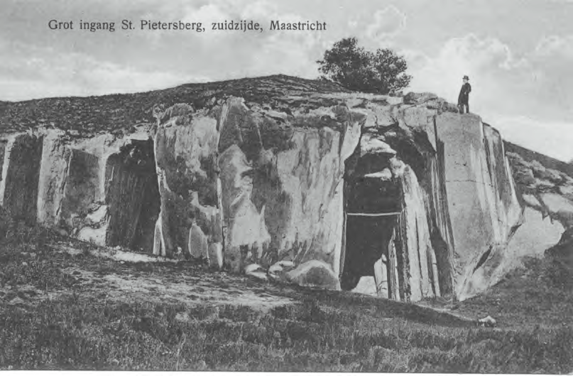 Prentbriefkaart van Oude Marendaal (verzonden in 1924), Sint-Pietersberg, Maastricht, Nederland